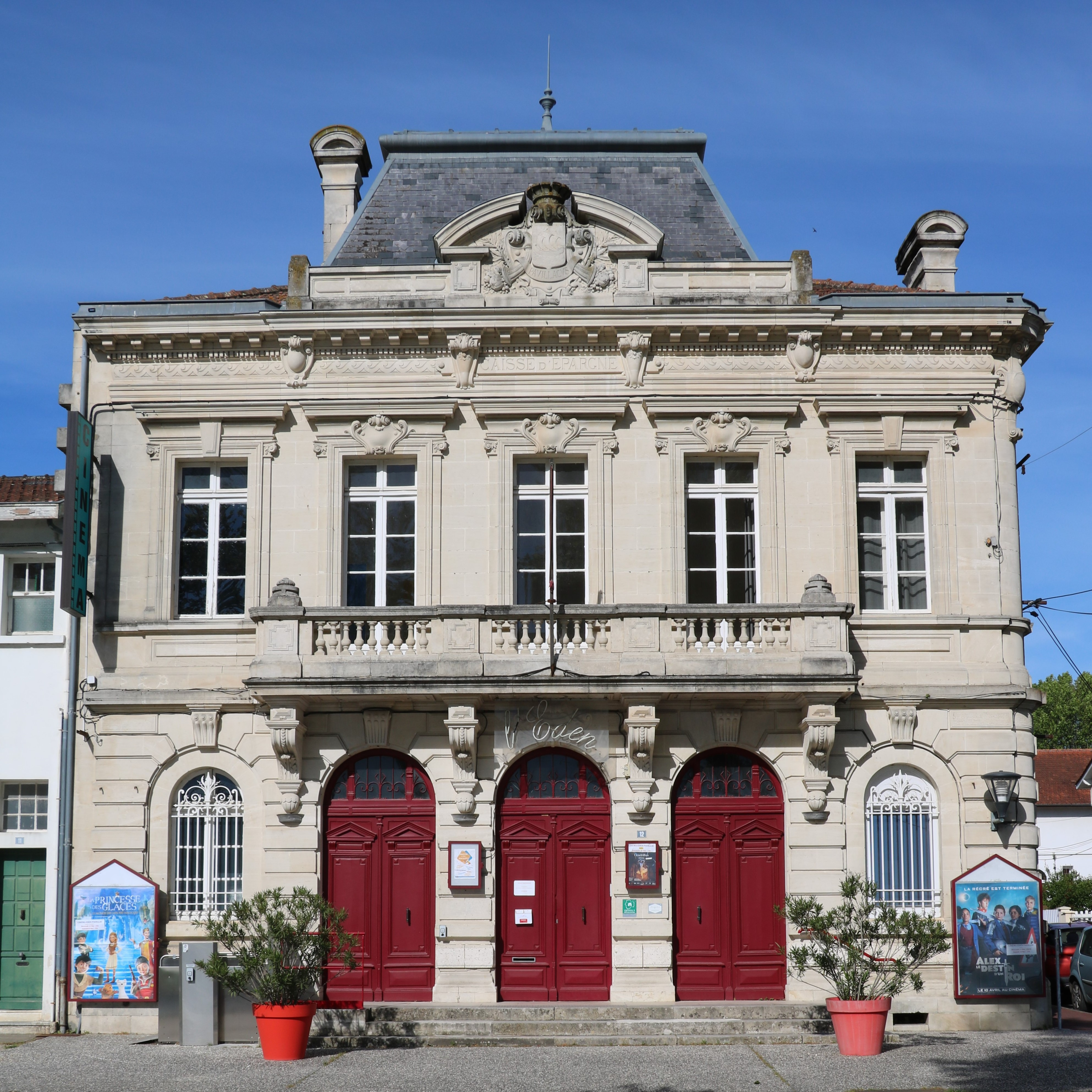 Cinéma l'Éden de Pauillac, construit à l'origine pour abriter par la Caisse d'Épargne